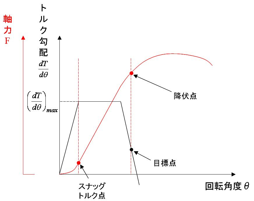 Torque gradient control method